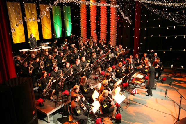 Koncert noworoczny - Orkiestra Dęta KWB Konin